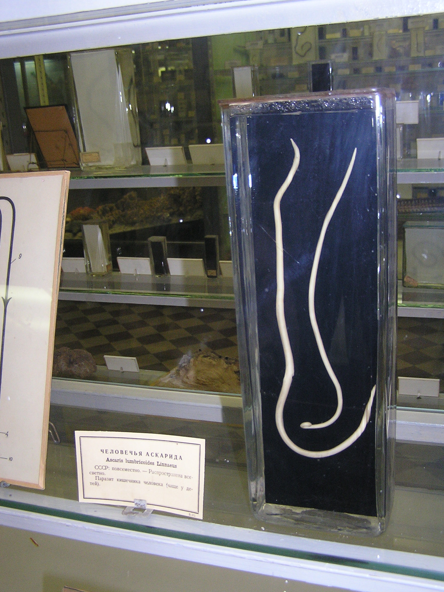 Зоологический музей в Санкт-Петербурге. Человеческая аскарида